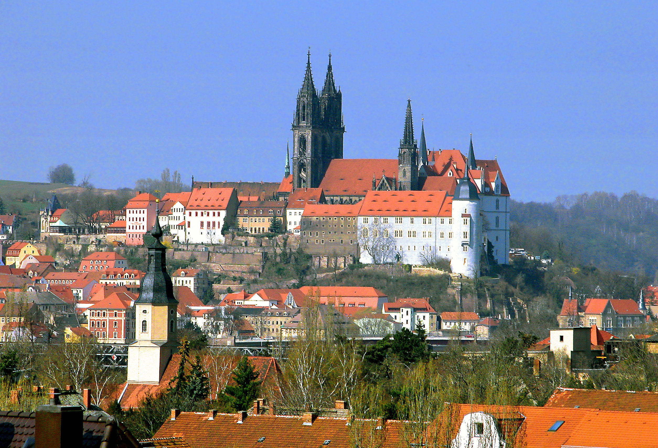 16.01.2005 01662 Meißen: Stadt und Burgberg von SO. König Heinrich I. gründete die Burg 929. Der Dom, frühgotisch nach 1240 begonnen, hat eine lange Baugeschichte. 1400 Westportal, 1443-1446 eingewölbt. Die Turmhelme, wurden erst 1904-1909 vollendet. Davor links d. Domherrenhäuser. Rechts das Bischofsschloß, erbaut ab 1476. Die Albrechtsburg selbst, eigentlich ein Schloß, ist hier rechts weitgehende verdeckt. [DSCN21616.TIF]20070328060DR.JPG(c)Blobelt